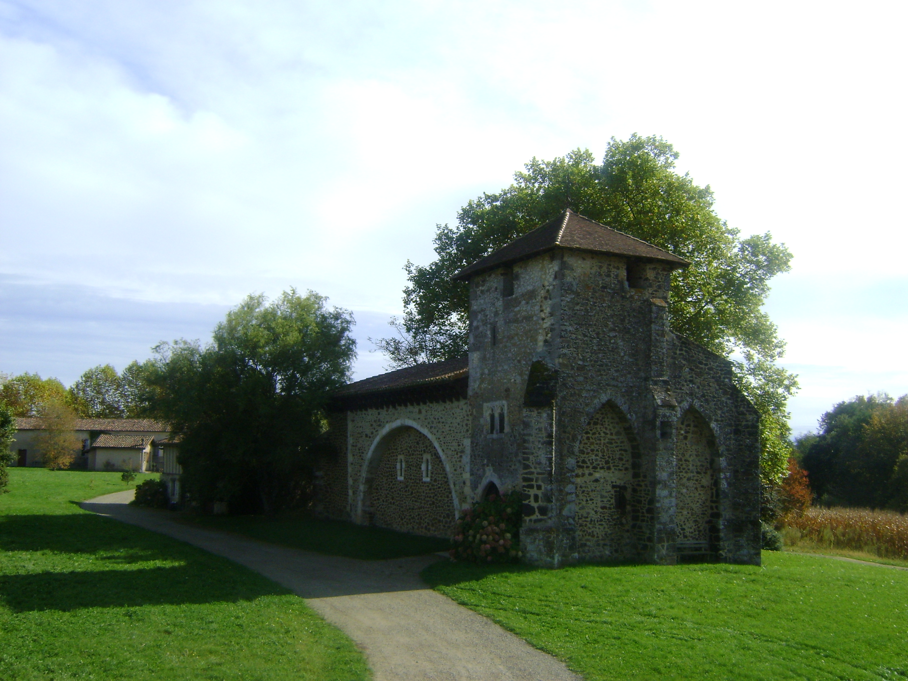 Chapelle de l'abbaye Notre-Dame de Maÿlis (Landes)